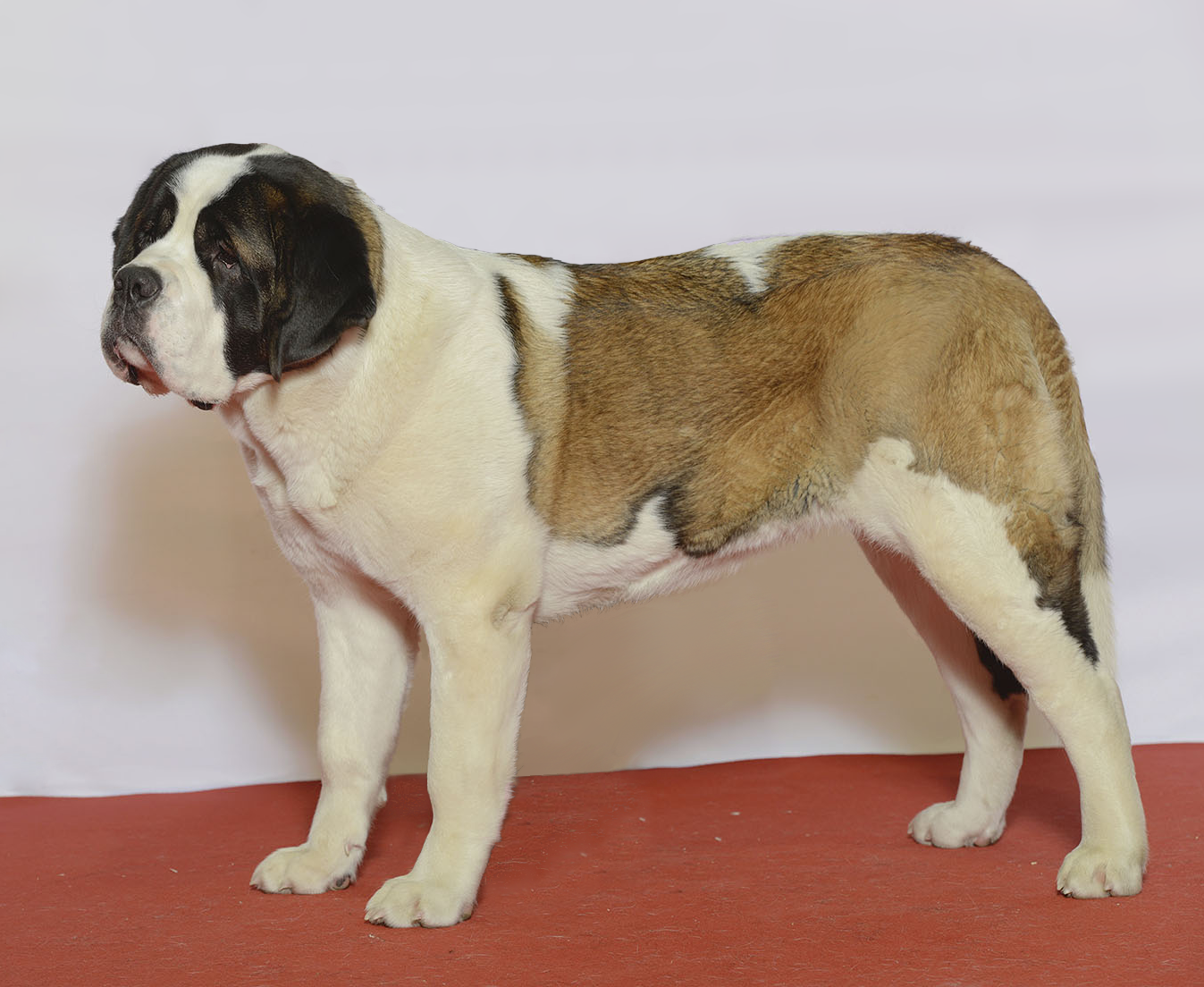 Grupp 2 SANK BERNHARDSHUND, KORTHÅRIG, St Zamba’s Downtown Diamond MyDOG, Nordens största hundevenemang